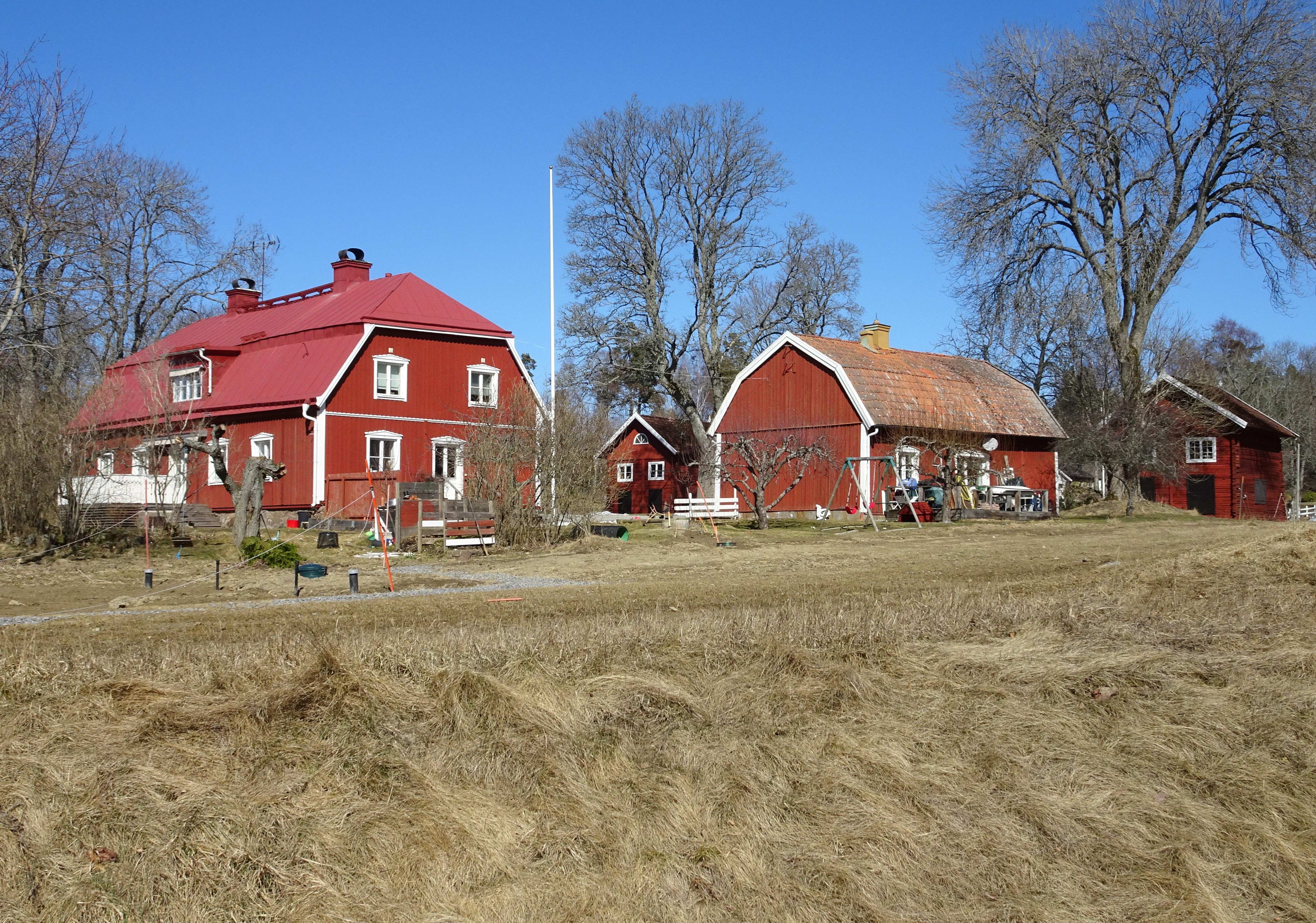 Rangsta gård, Sorunda socken